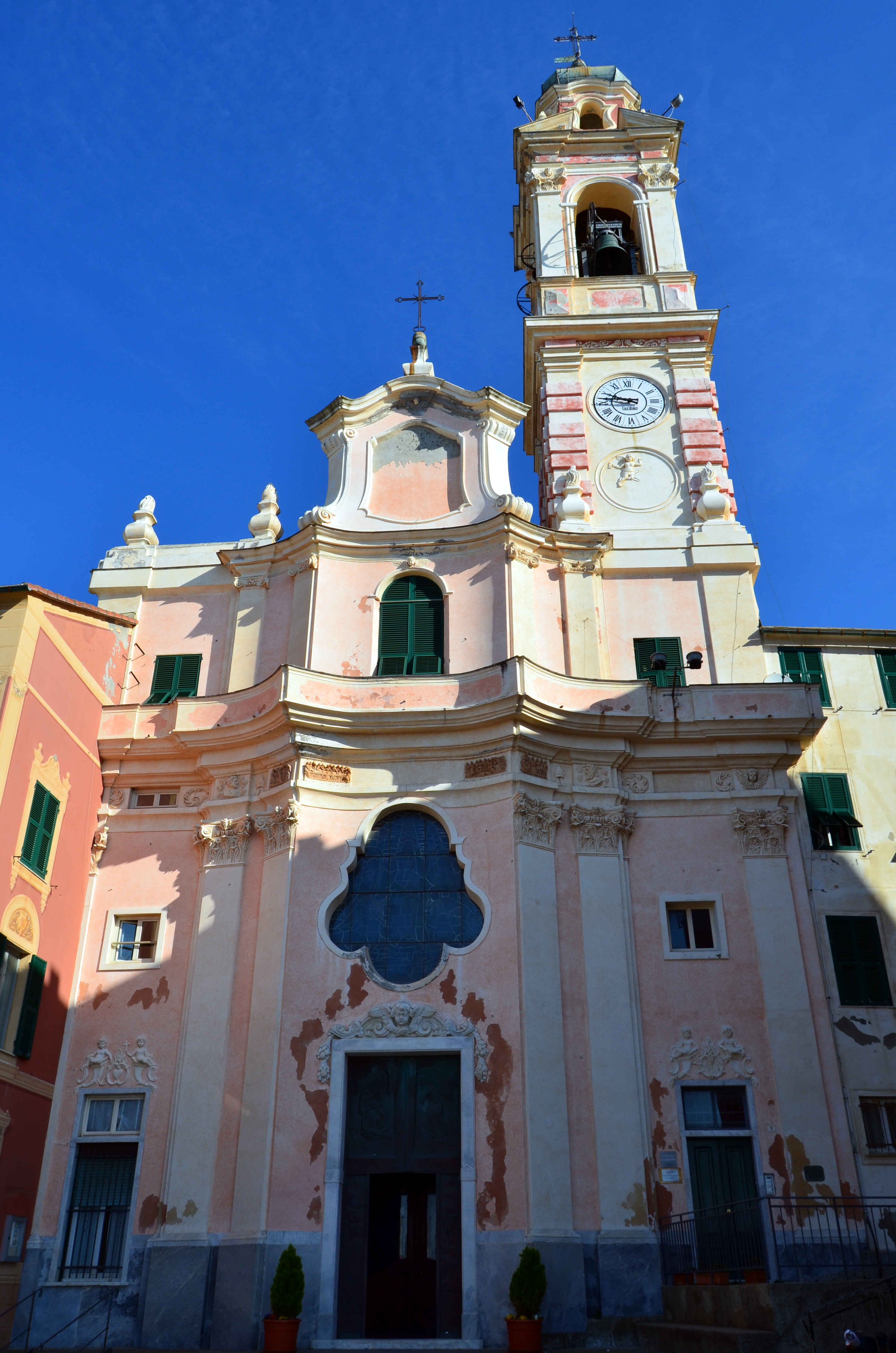 Chiesa di Santa Margherita, Sori, Liguria, Italia